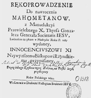 Teofil Rutka, Rękoprowadzenie do nawrocenia Mahometanow [...], strona tytułowa. Roku Pańskiego 1694, we Lwowie, w Drukarni Kollegium Societatis Iesu